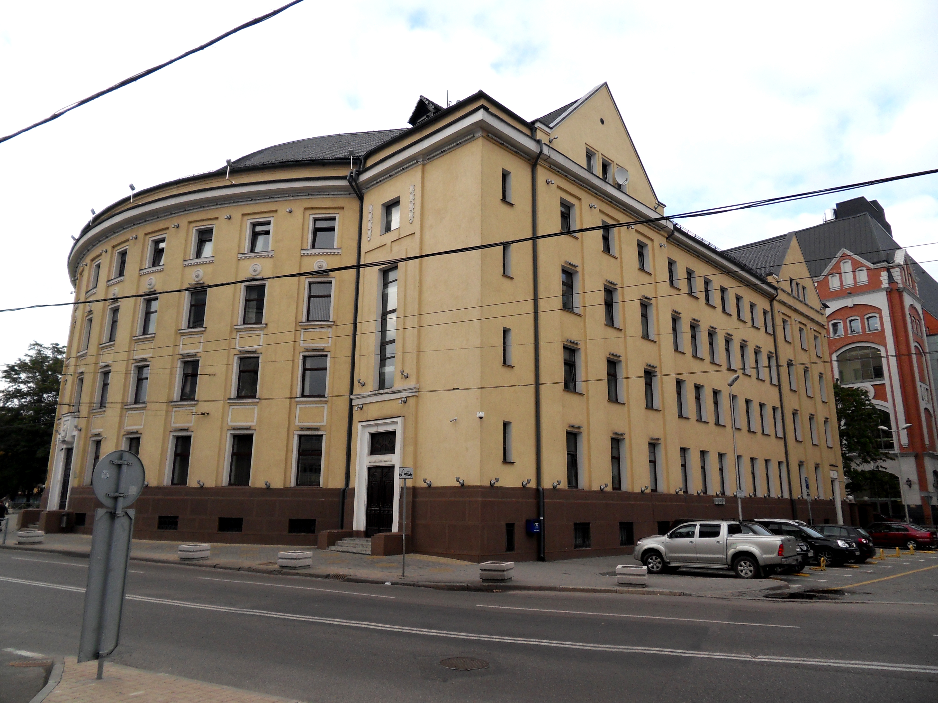 Здание управления почтовых переводов (Калиниградская область, Калининград, театральная улица, 34)